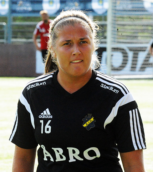 Filippa Angeldal (AIK)